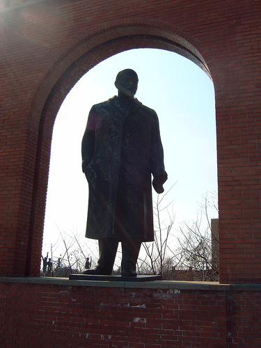 Estátua de Lenine no parque das estátuas de Budapeste (Szoborpark). Statue of Lenin, communist statue park, Budapest (Szoborpark).